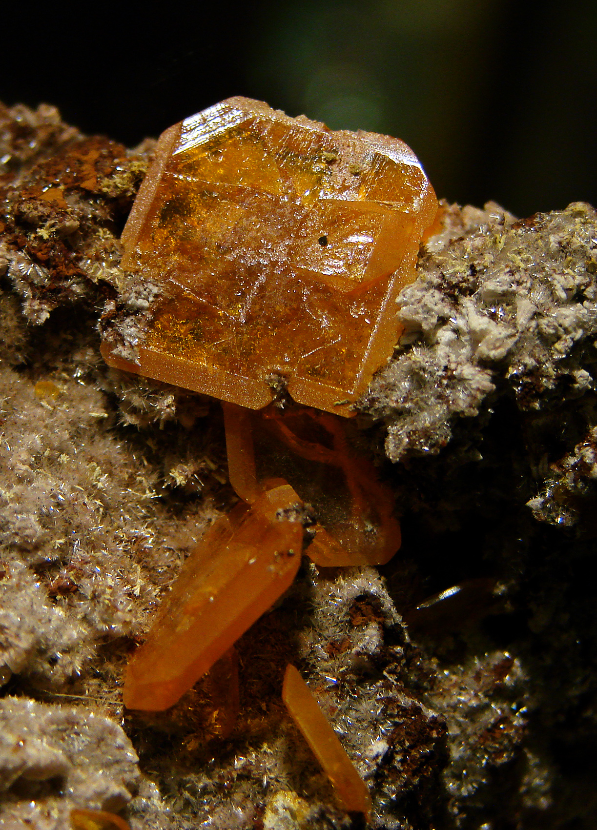 Wulfénite. Provenance: Mexique.